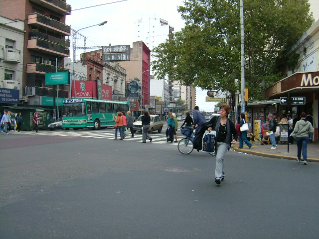 Imagen de la Intersección entre la Avenida Mitre y la calle Alsina